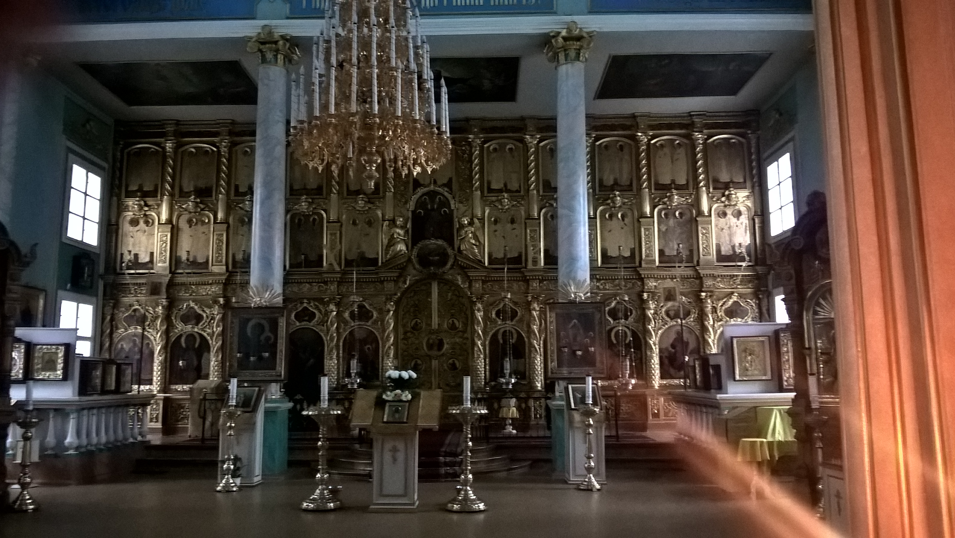 Wnętrze cerkwi Zwiastowania w Rydze